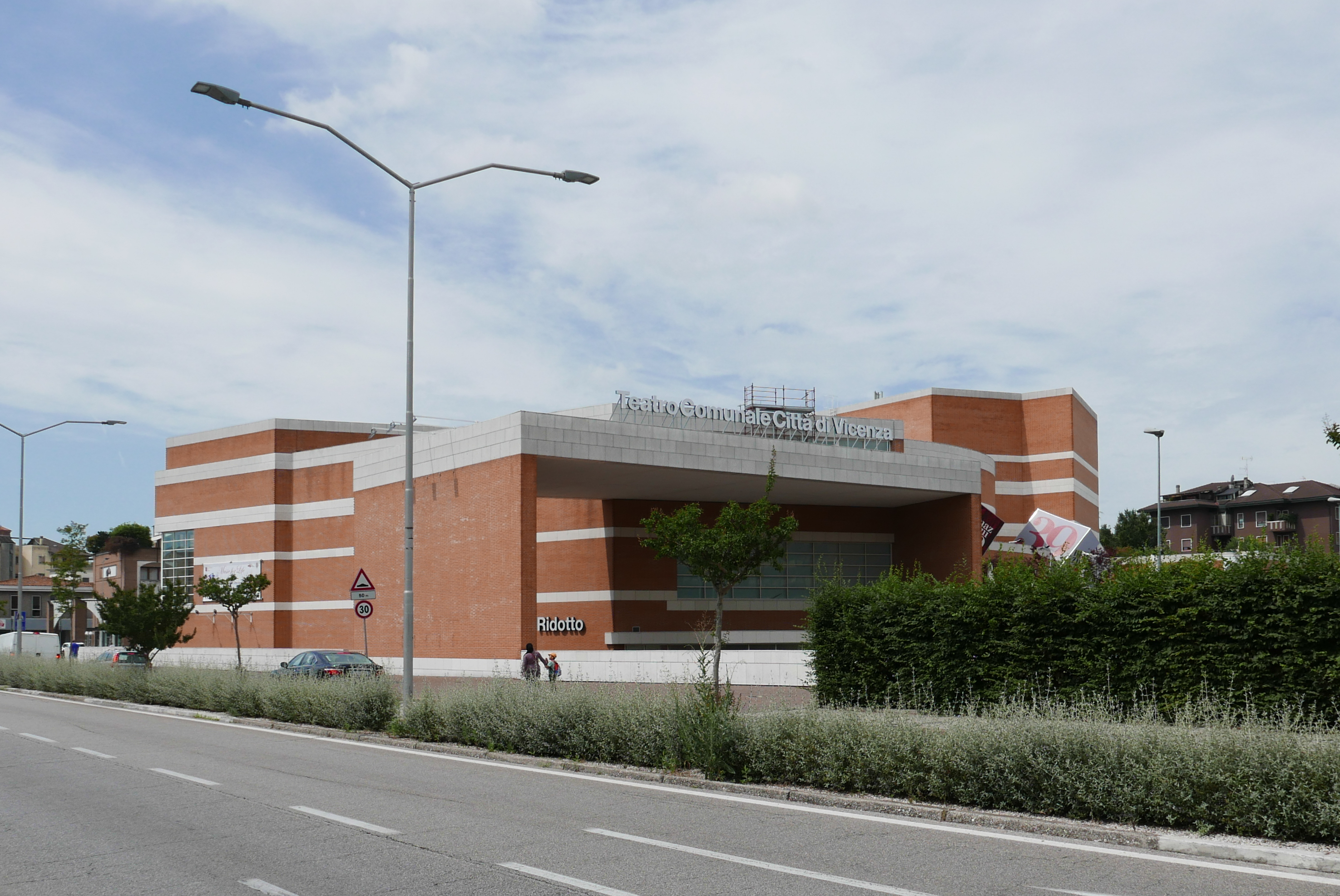 Viale Mazzini a Vicenza